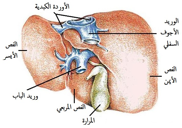 صورة توضيحية للأوردة الكبدية، وريد الباب، والوريد الأجوف السفلي.